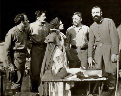 Photo de Special Messenger, un film de la compagnie Kalem, tourné en 1911, en Floride